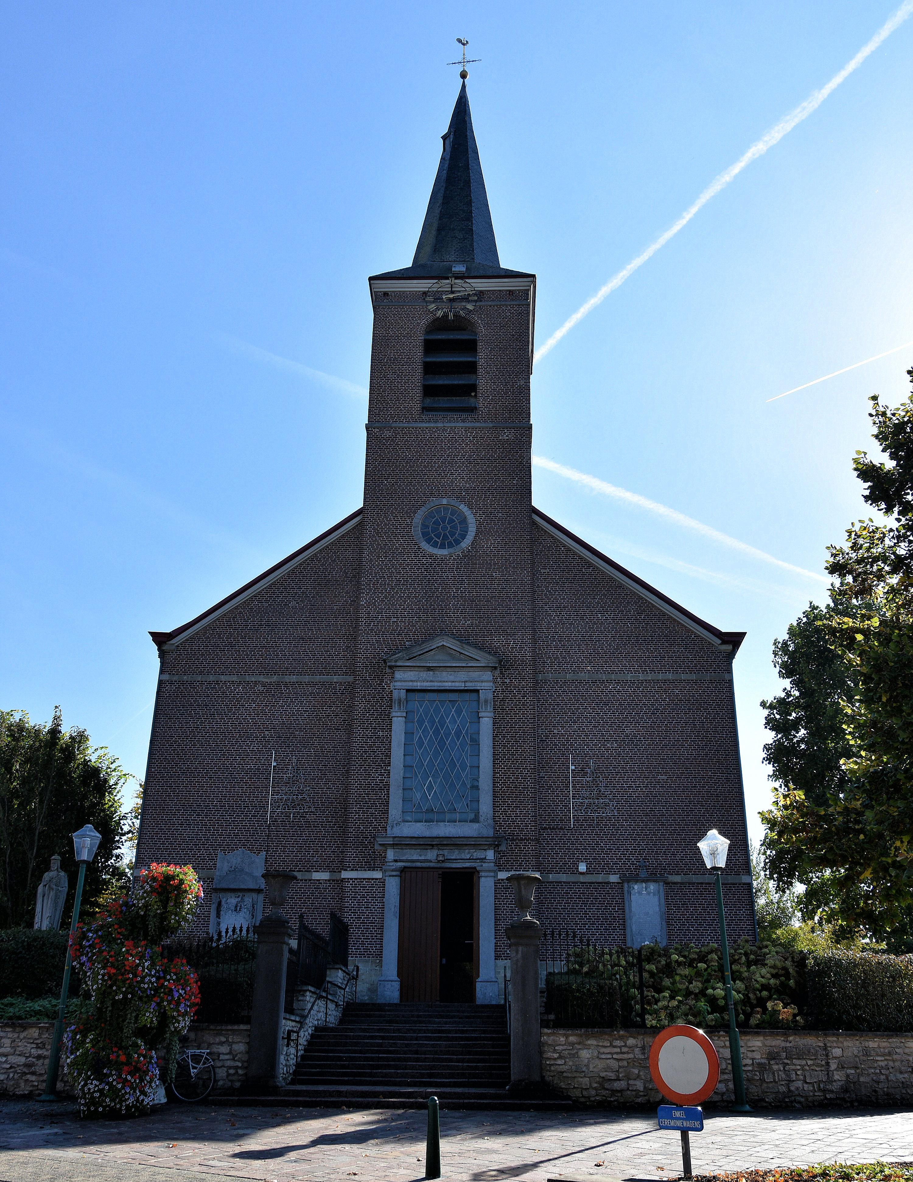 Sint-Martinuskerk (Erpe) voorgevel 5-10-2018 This photo of immovable heritage has been taken in the Flemish Region